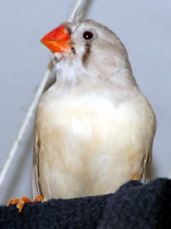 pl Samica Zeberki